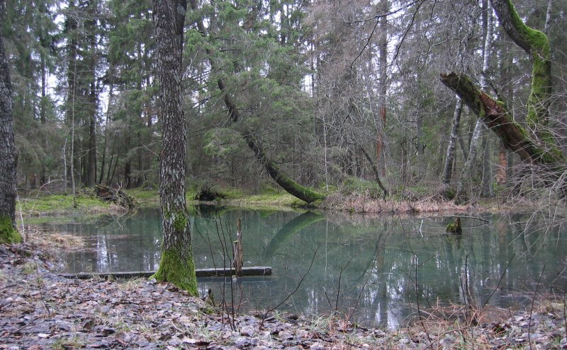 Mustallikas Paekülas Märjamaa vallas Rapla maakonnas.